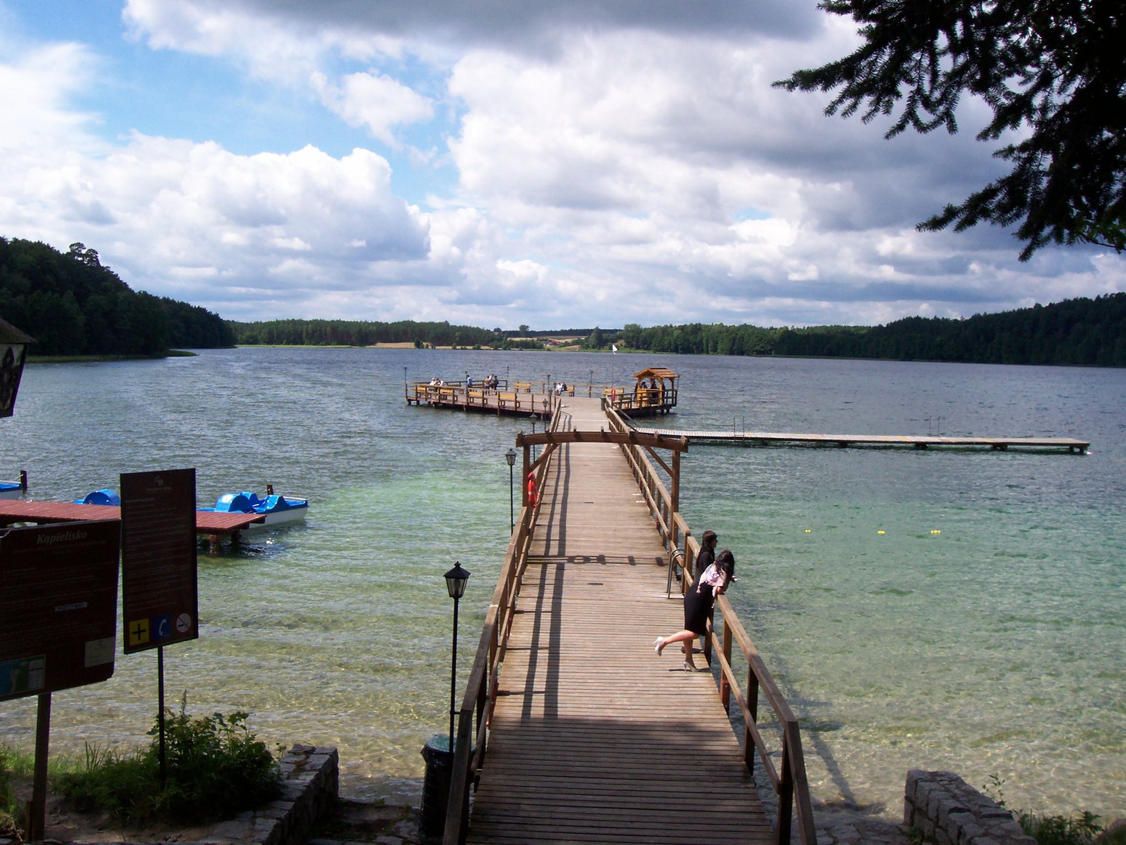 Jezioro Niedackie w powiecie starogardzkim, widok z Twardego Dołu